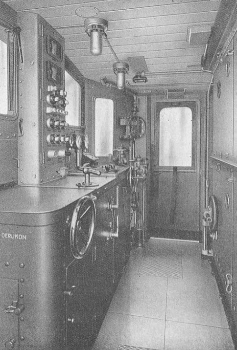 Innenansicht der Führerstands einer SBB Ce 6/8 II (Krokodil-Lokomotive)